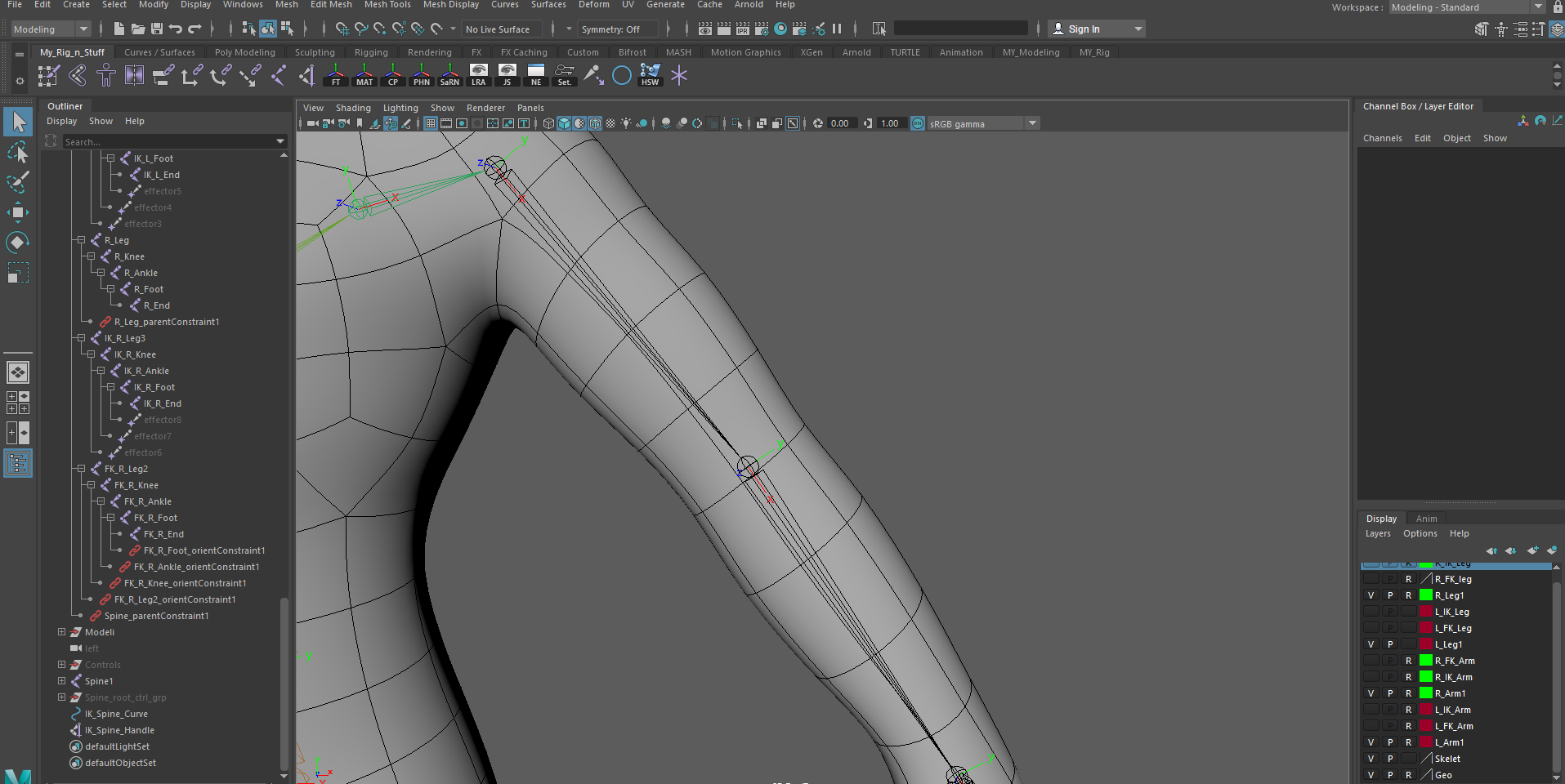 Srpski (latinica): Lanac zglobova u rigu